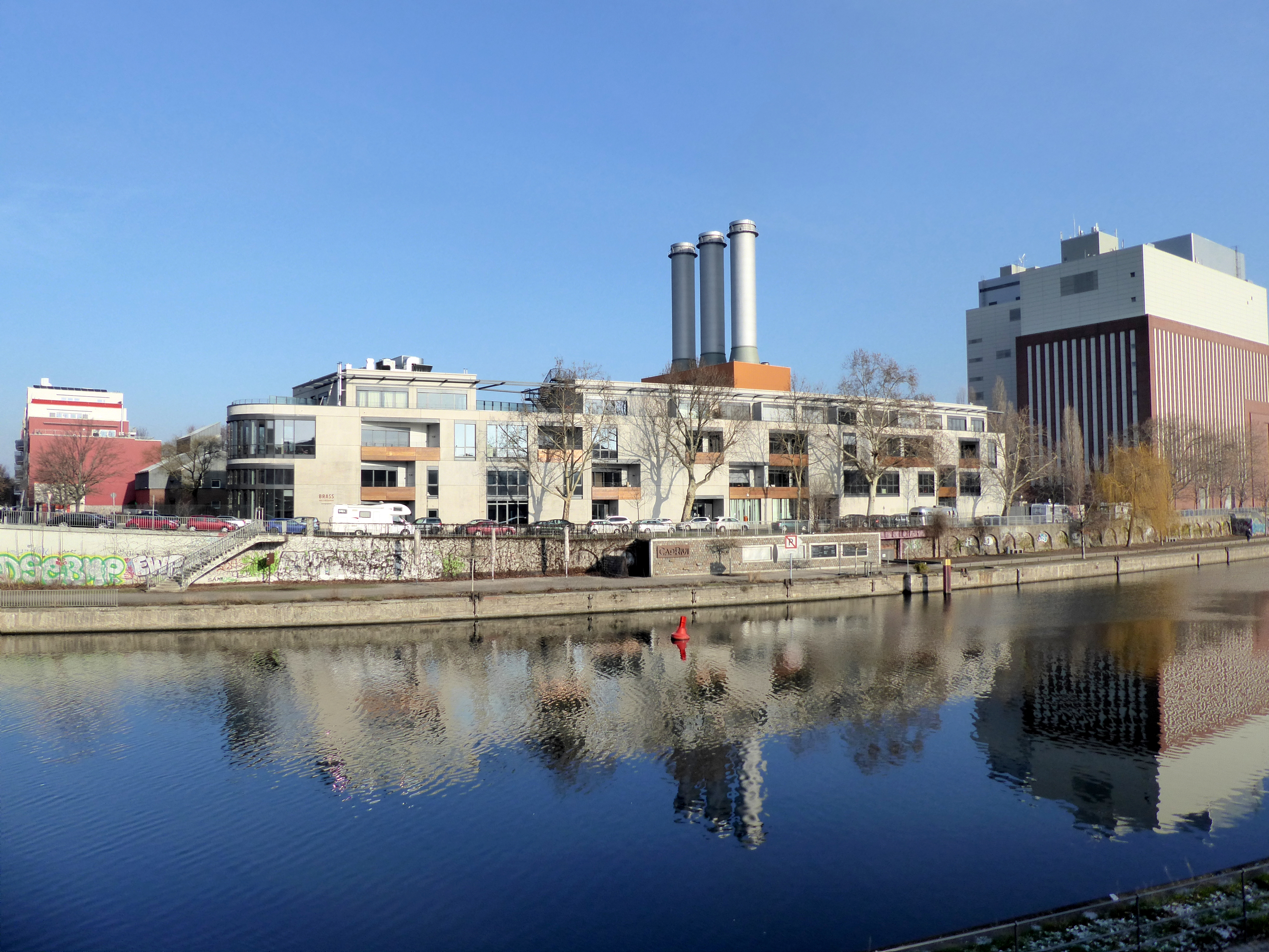 Blick über die Spree zum Charlottenburger Skulpturenzentrum am Spreebord